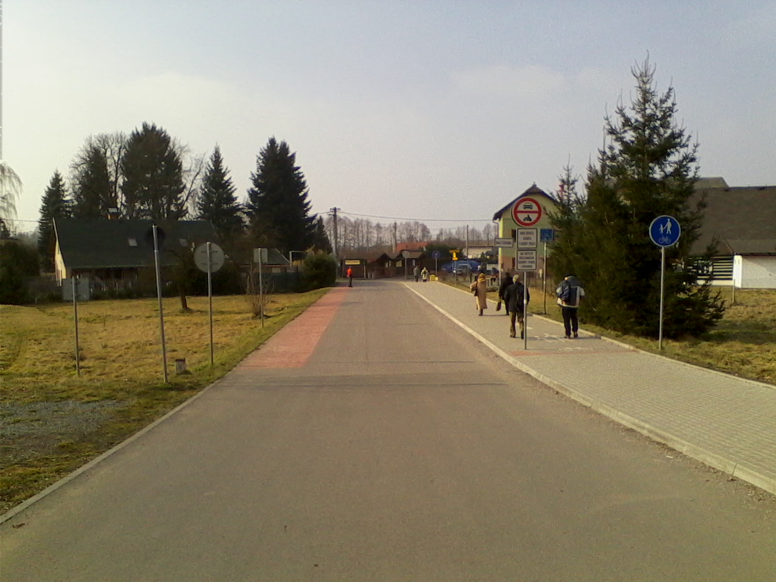 Nova fotka hraniniho přechodu, prujezd autem možny, ale jen pro obyvatele Hronova a Kudowy Zdróje.